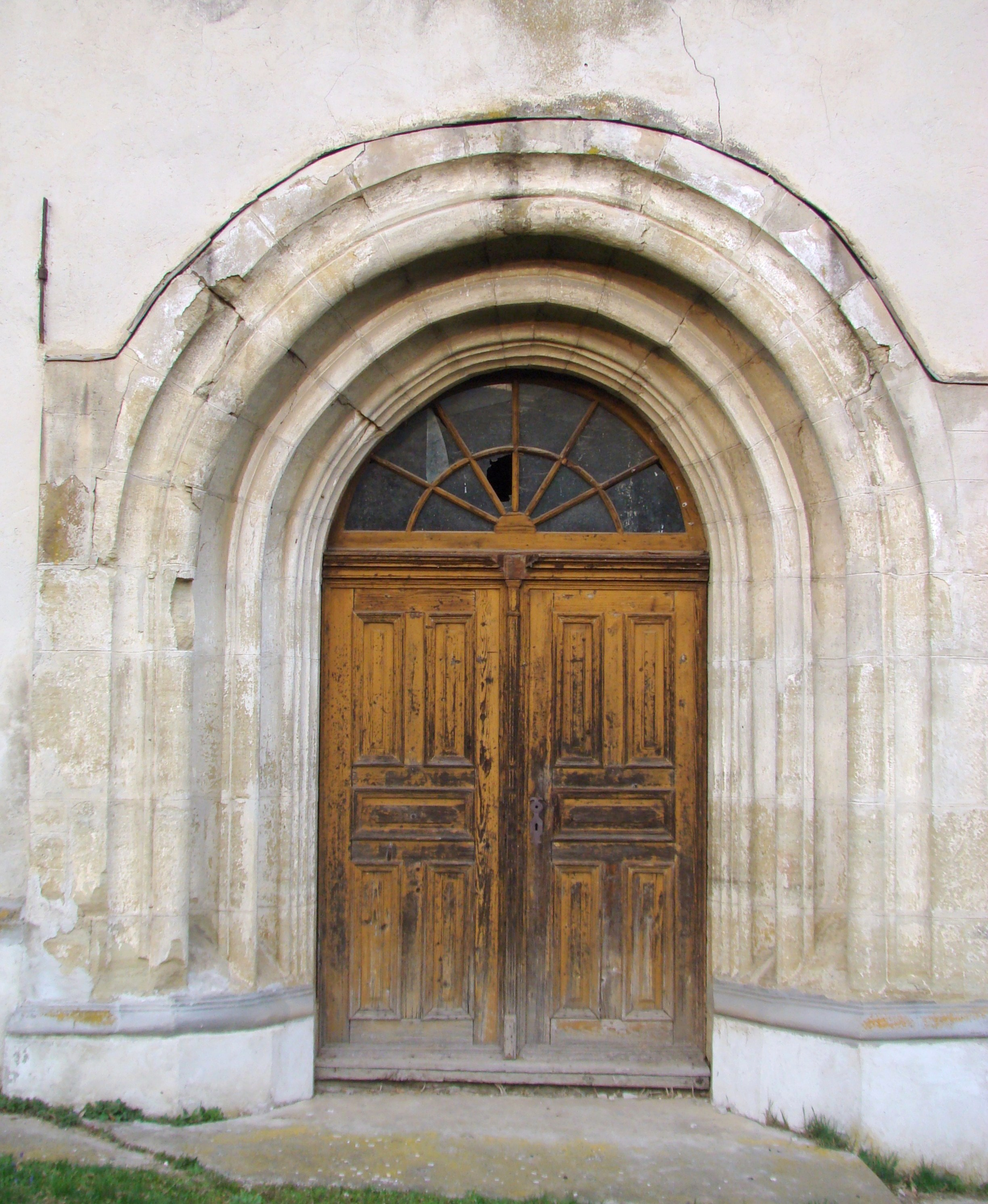 Biserica evanghelică, sat Lechința; comuna Lechința, județul Bistrița-Năsăud